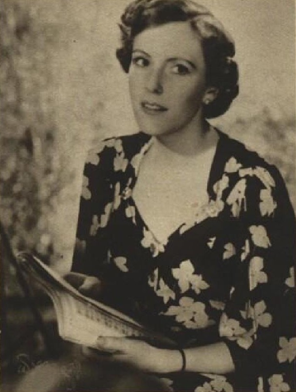 Jarmila Novotná (1907-1994), česká zpěvačka, filmová herečka a operní pěvkyně